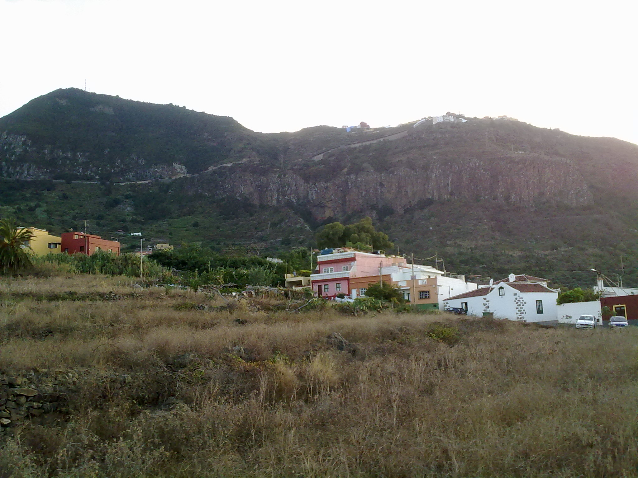 Vista del risco de Tigaiga desde el Quinto.